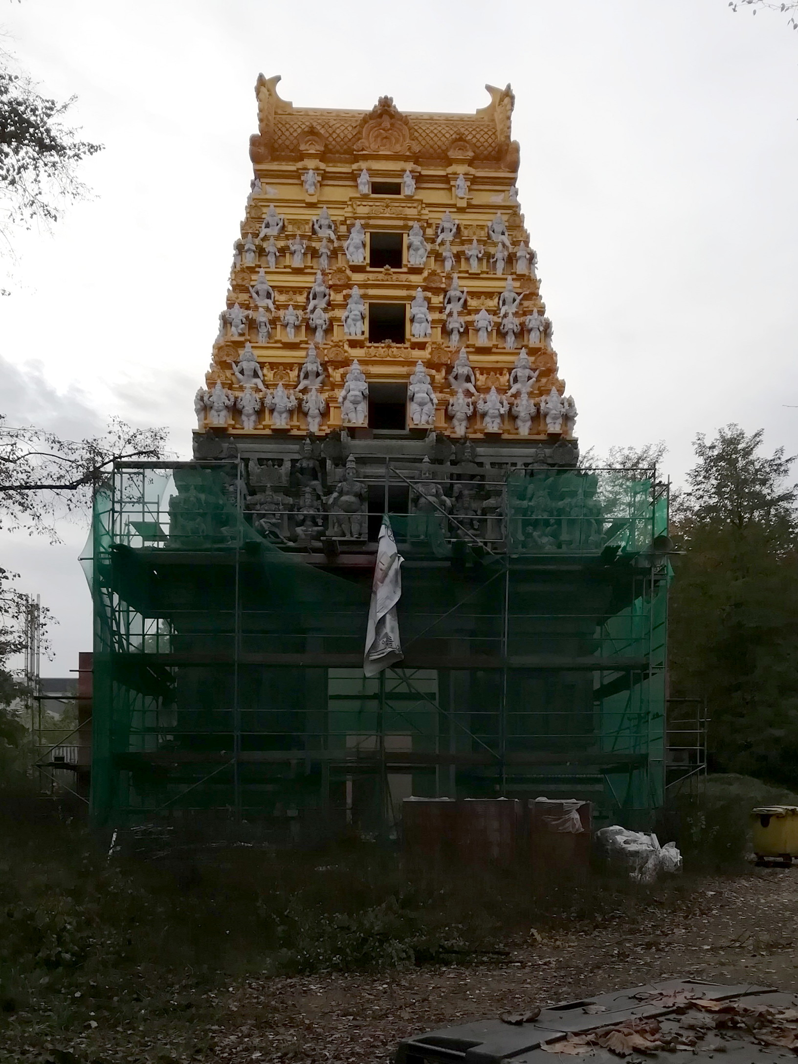 Sri Ganesha Hindu Tempel in Berlin